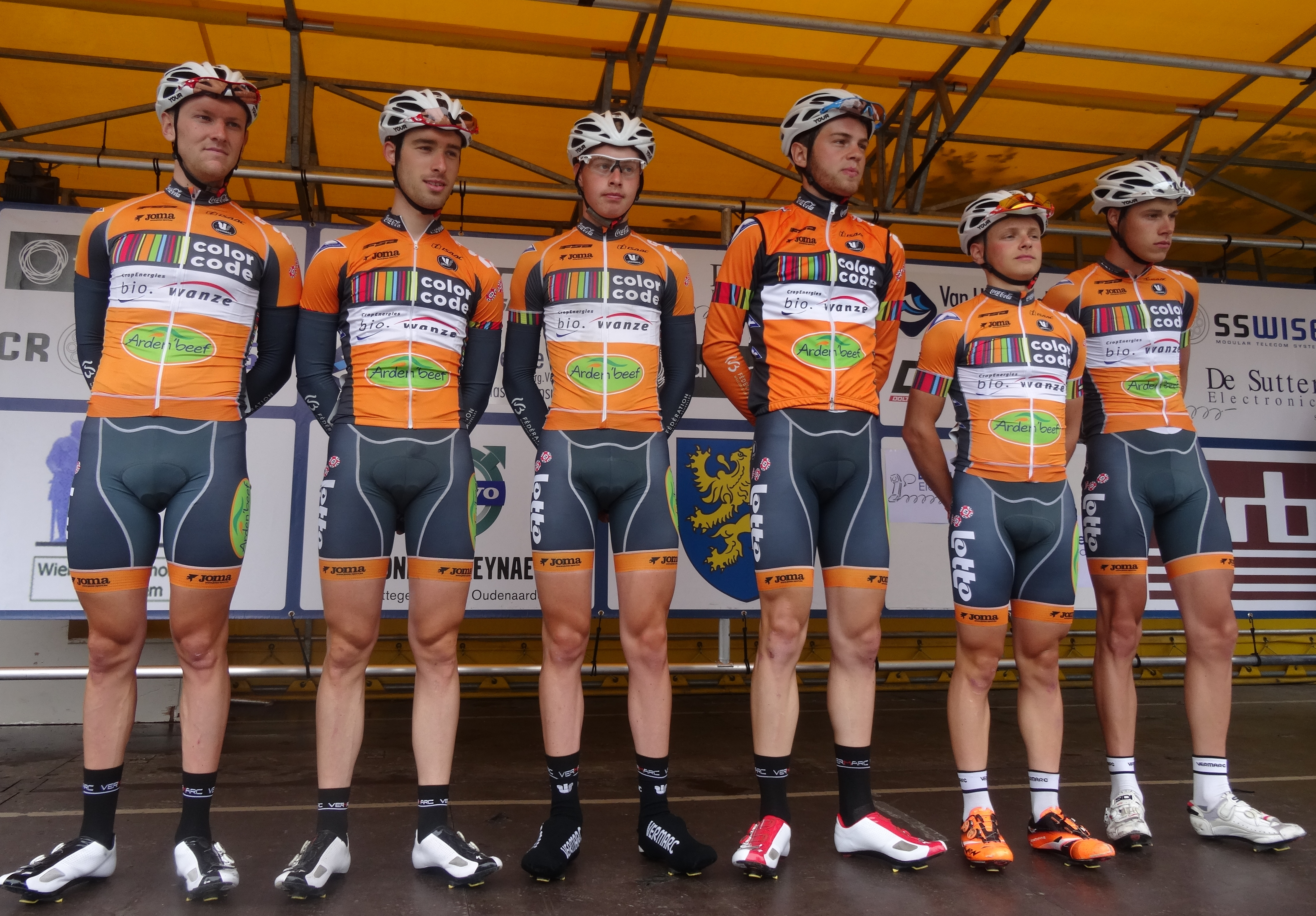 Reportage photographique réalisé le samedi 5 juillet à l'occasion du départ et de l'arrivée du Circuit Het Nieuwsblad espoirs 2014 à Grotenberge (Zottegem), Belgique.